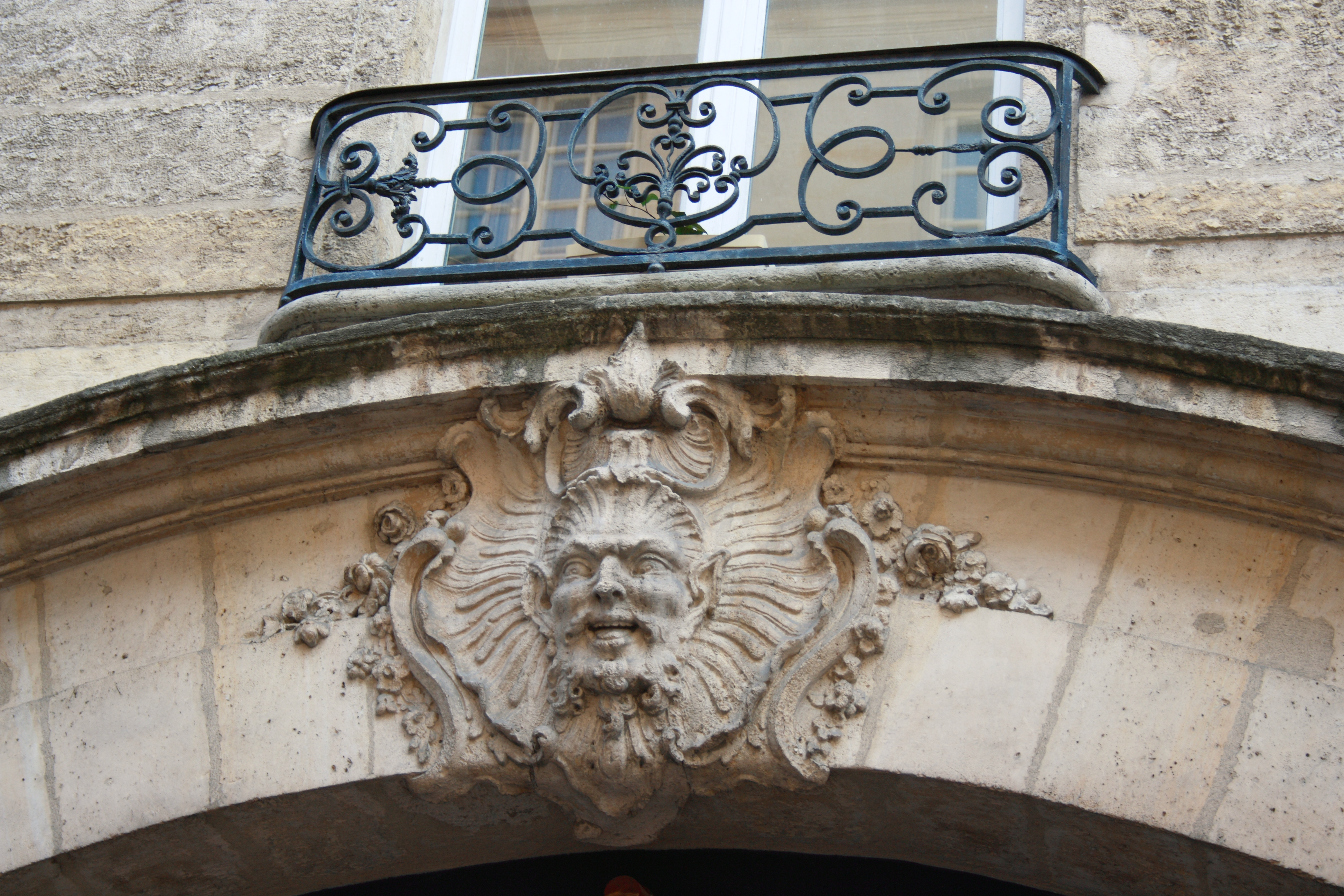 Hôtel Le Rebours im Marais im 4. Arrondissement in Paris (Île-de-France/Frankreich), Maskaron an der Fassade zur Straße